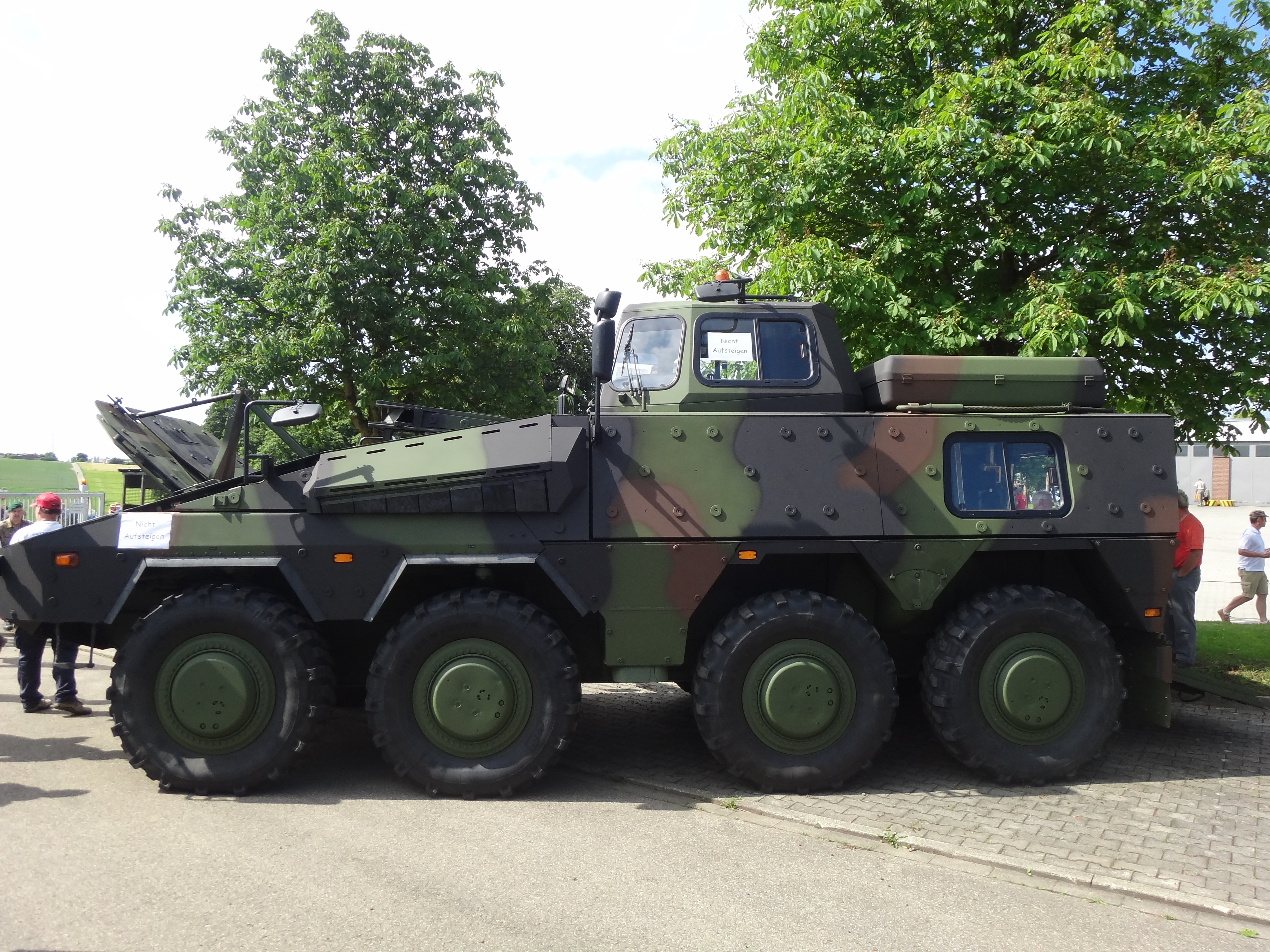 Fahrschulpanzer GTK Boxer